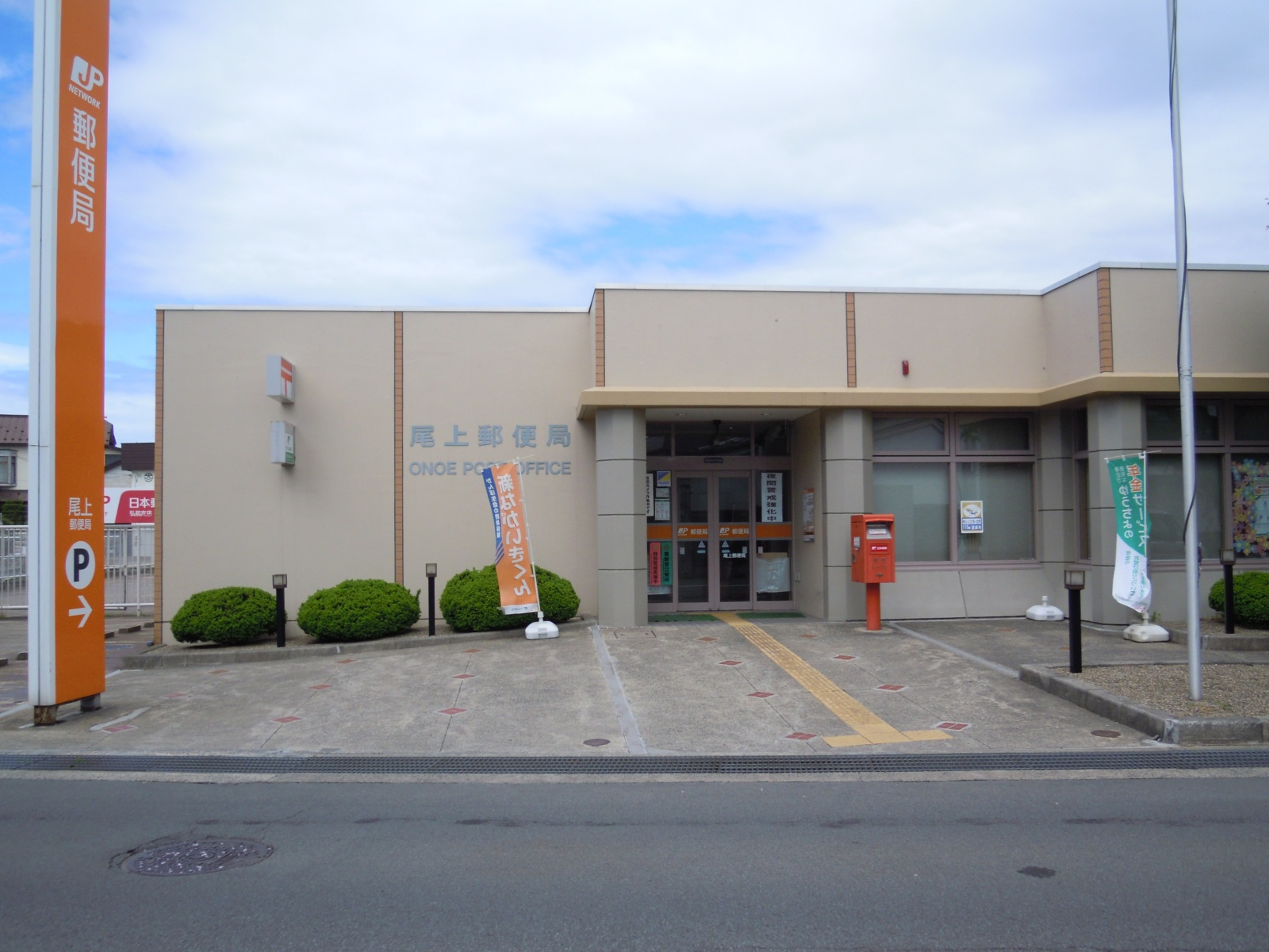 青森県平川市にある尾上郵便局庁舎